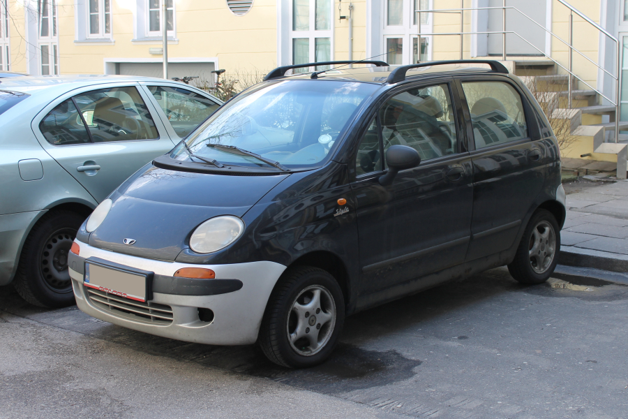 Samochód Daewoo Matiz M100 w wersji Style na parkingu w Warszawie.